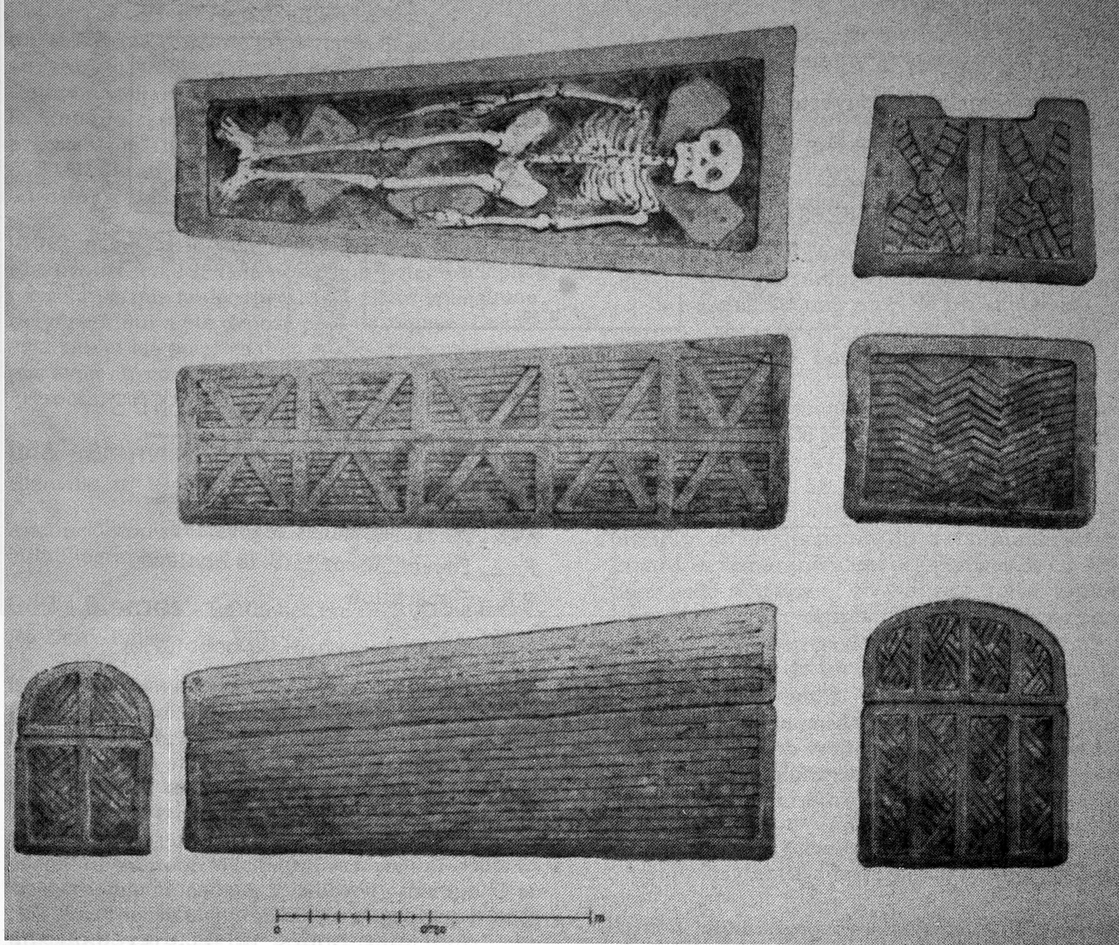 resultat de fouilles archéologiques.